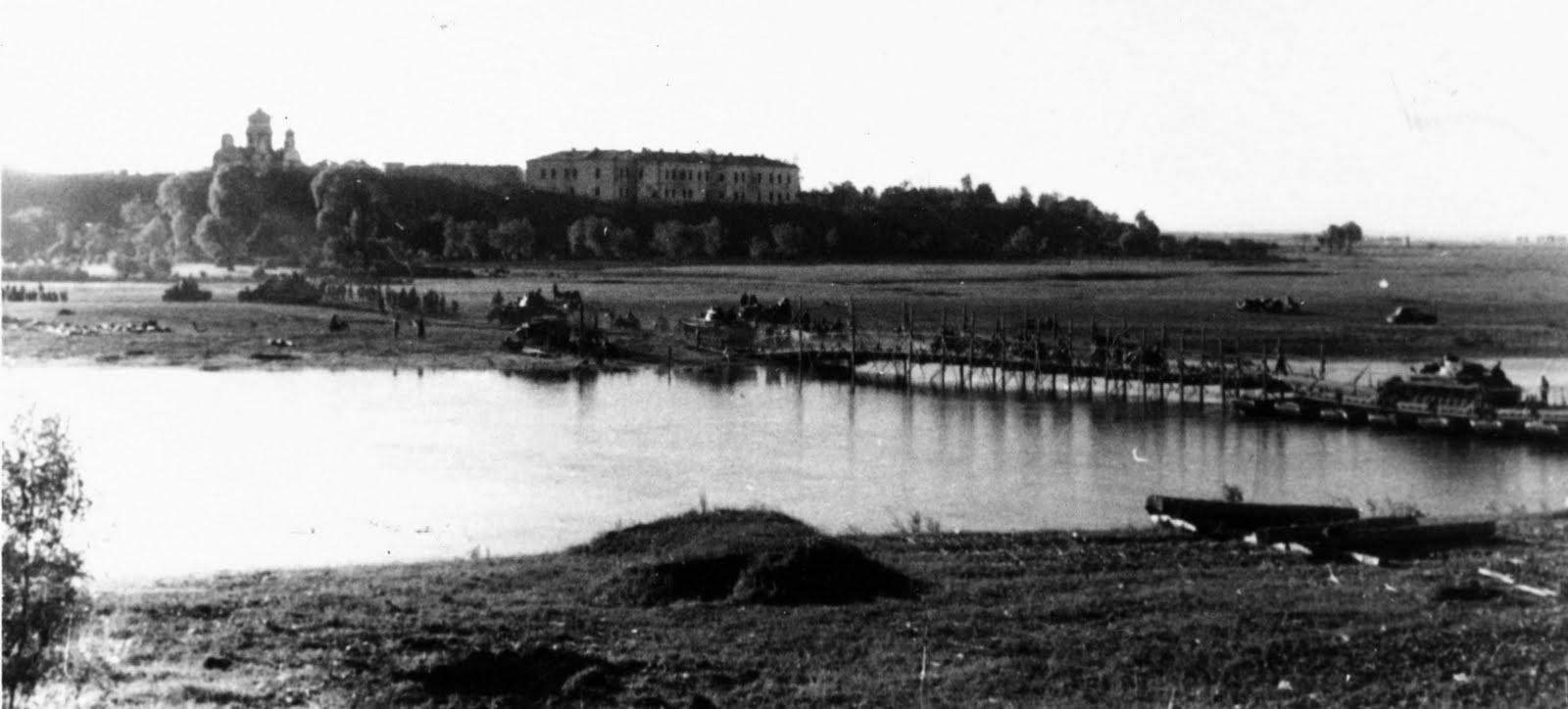 Беларуская (тарашкевіца): Быхаў (Bychaŭ), рака Дняпро (Dniapro). Панарама места